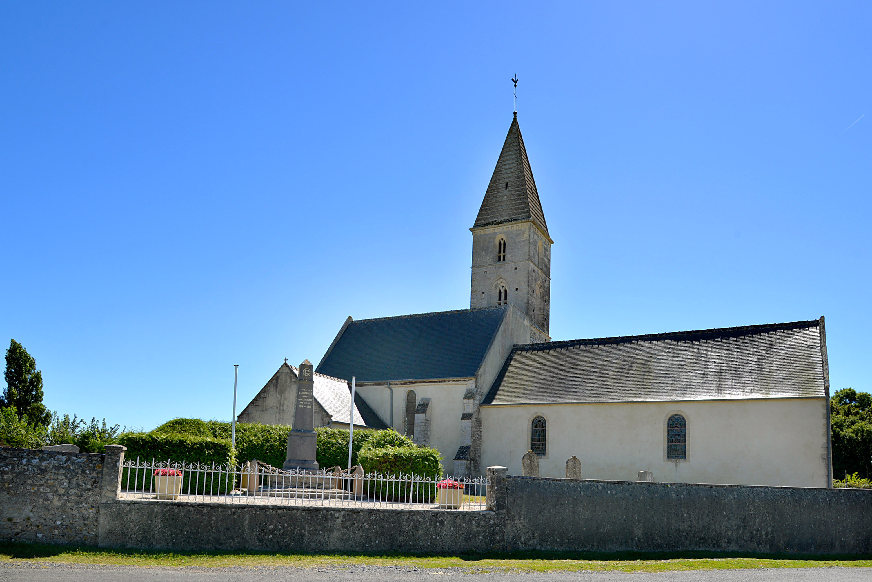 Aignerville (Calvados)